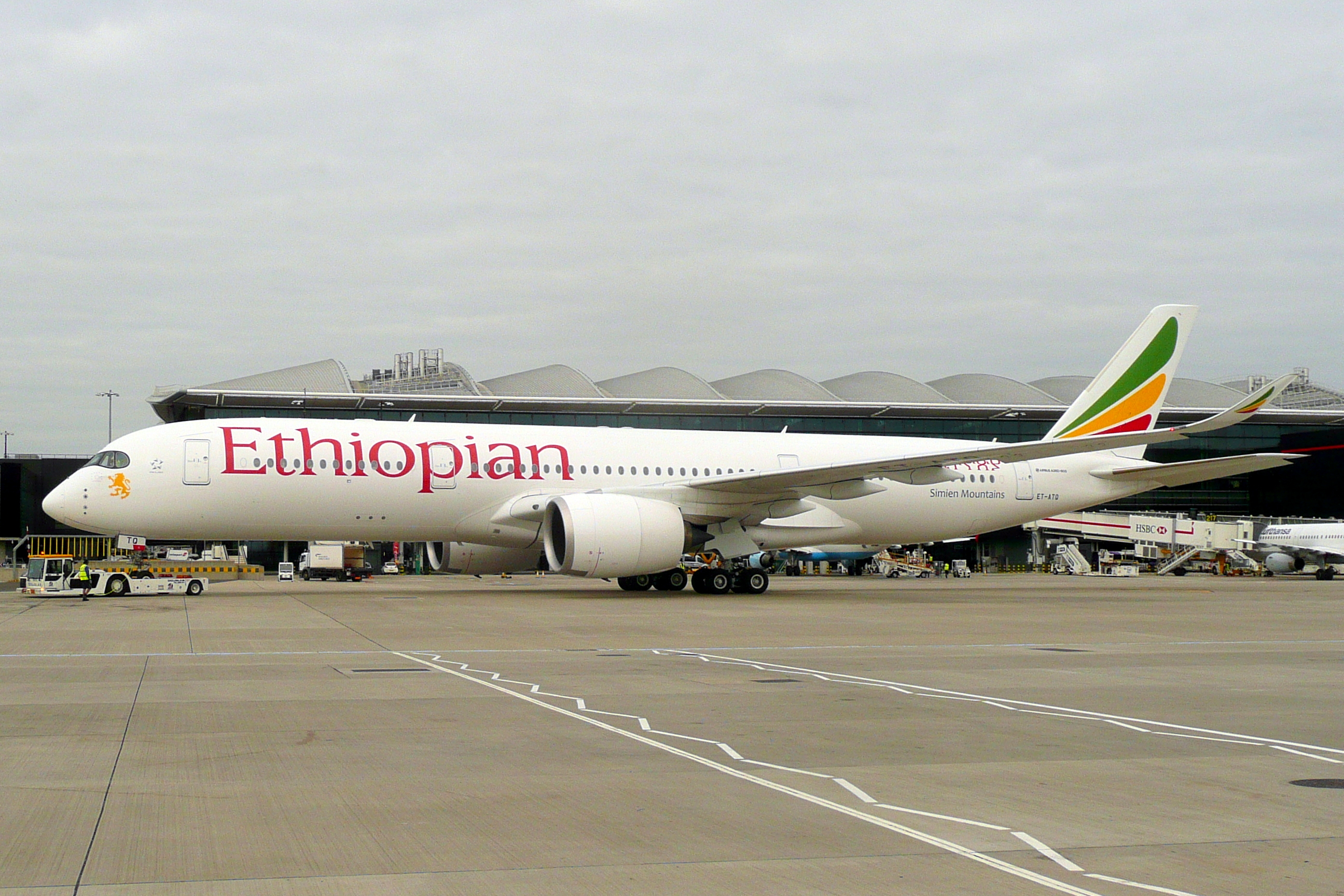 ET-ANQ 14082016LHR